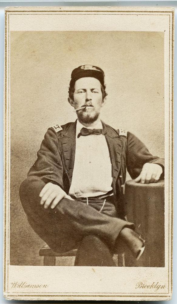 Lieutenant Commander Charles W. Flusser, U.S. Navy